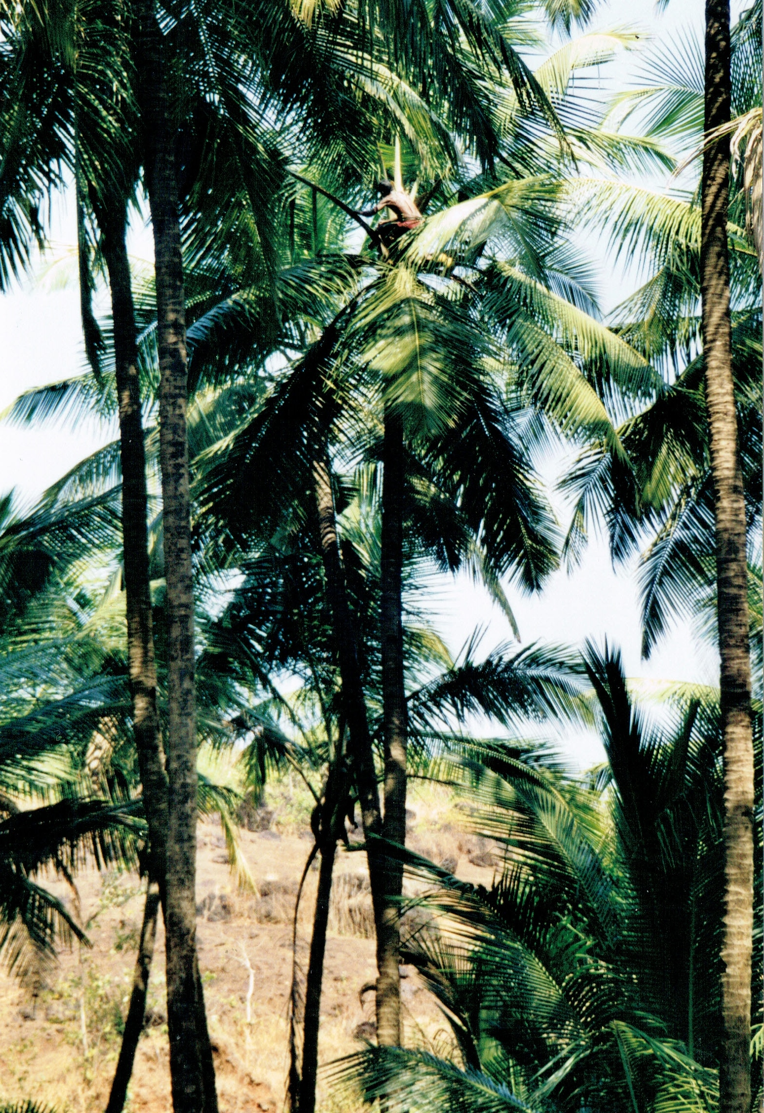 Pflücken von Kokonüssen für Turisten (in der Krone Palme mitte); Nuem Beach, südlich von Cavelossim, Salcete